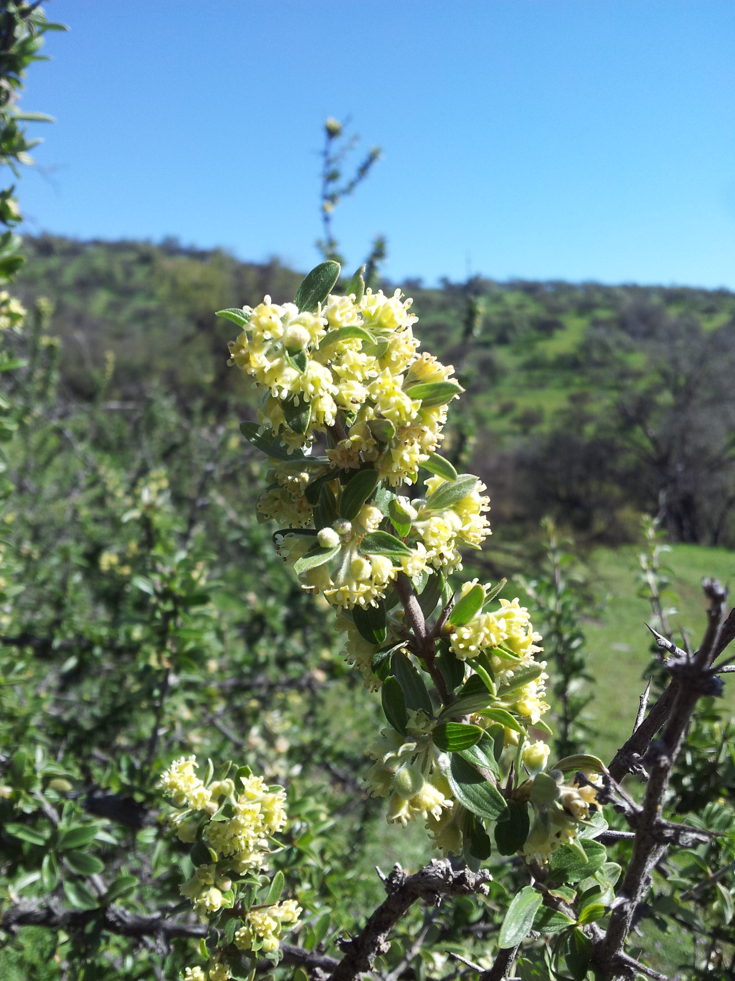 Tralhuén, tralhuena